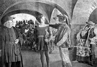 Fotogramma di Monna Vanna, regia Mario Caserini, prod Ambrosio Film Torino, 1916